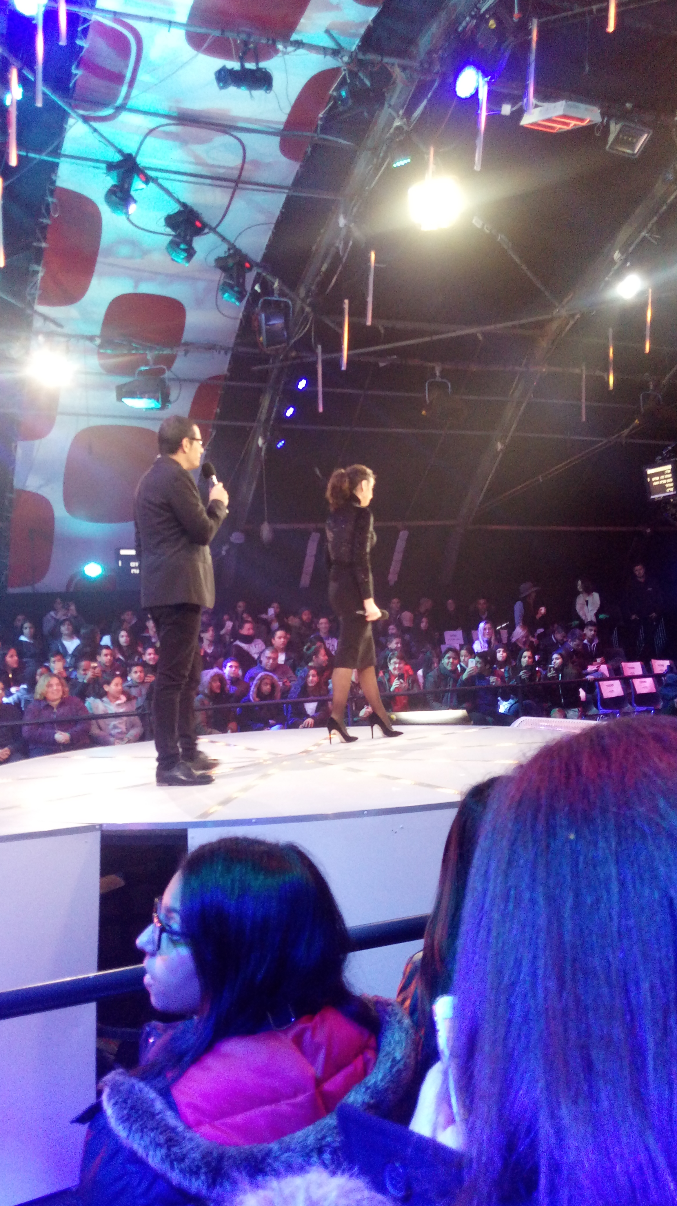 ארז וקורין